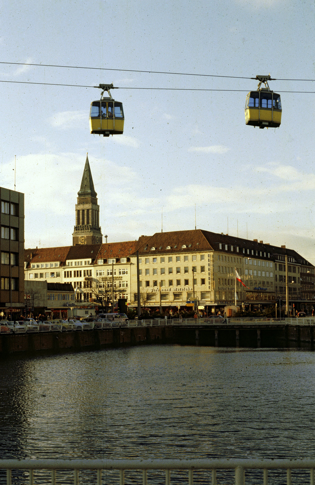 Stadtseilbahn in Kiel